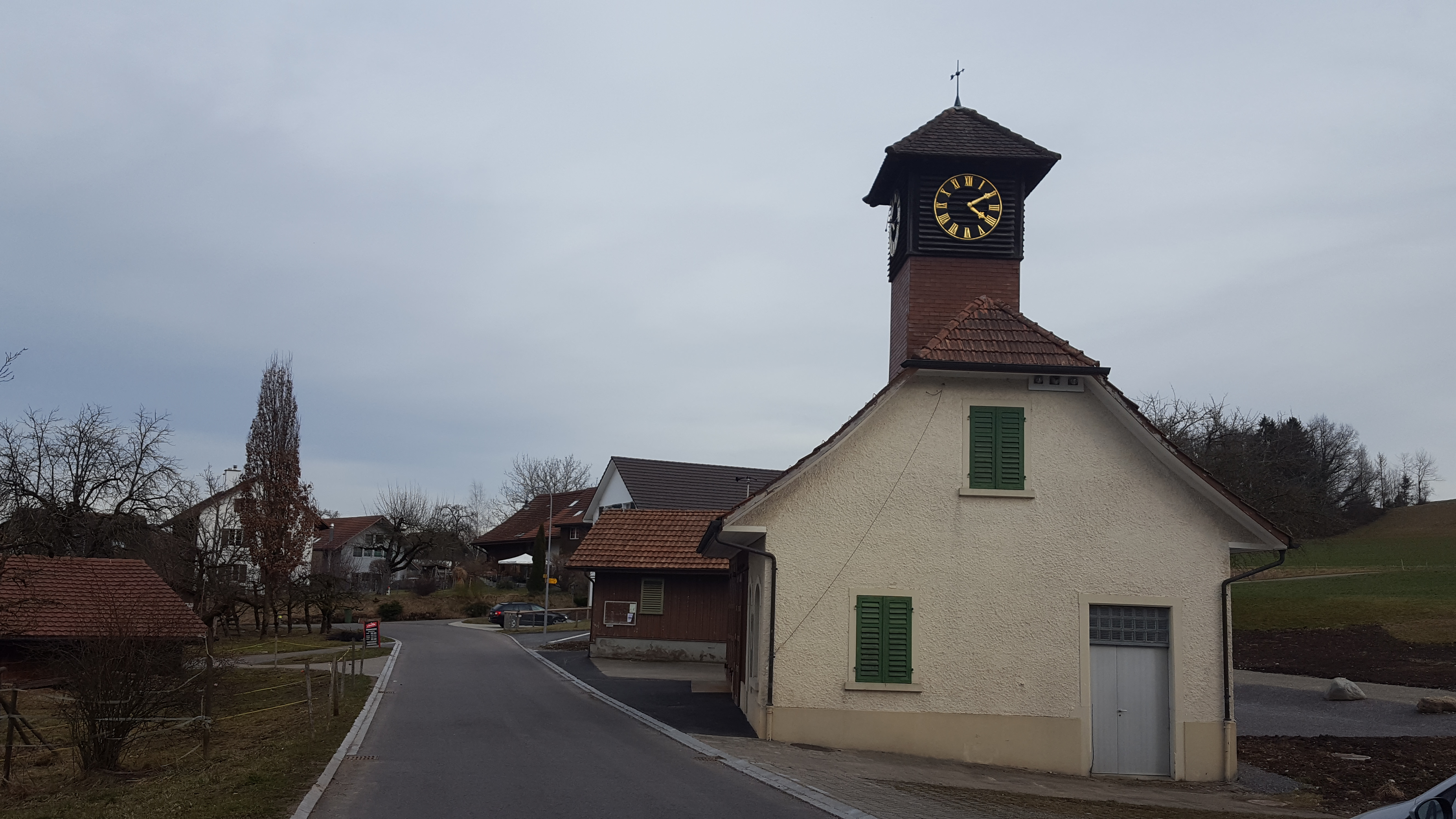 Neschwil, Feuerwehrhaus?